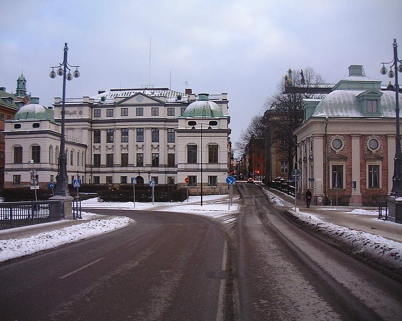 Vasabron, Stockholm, in February 2007.